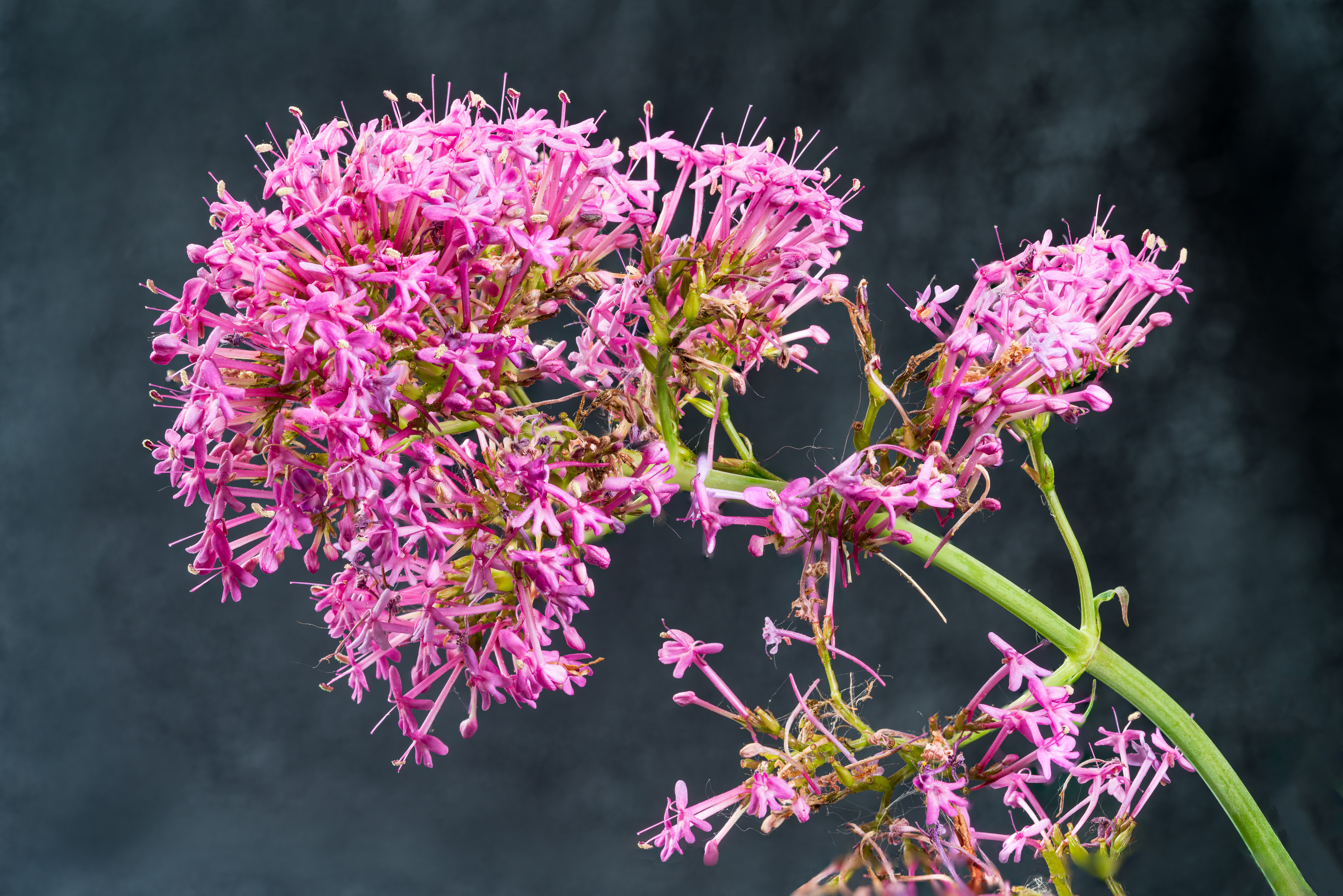 Image réalisée par empilement (focus stacking) de 14 prises de vues